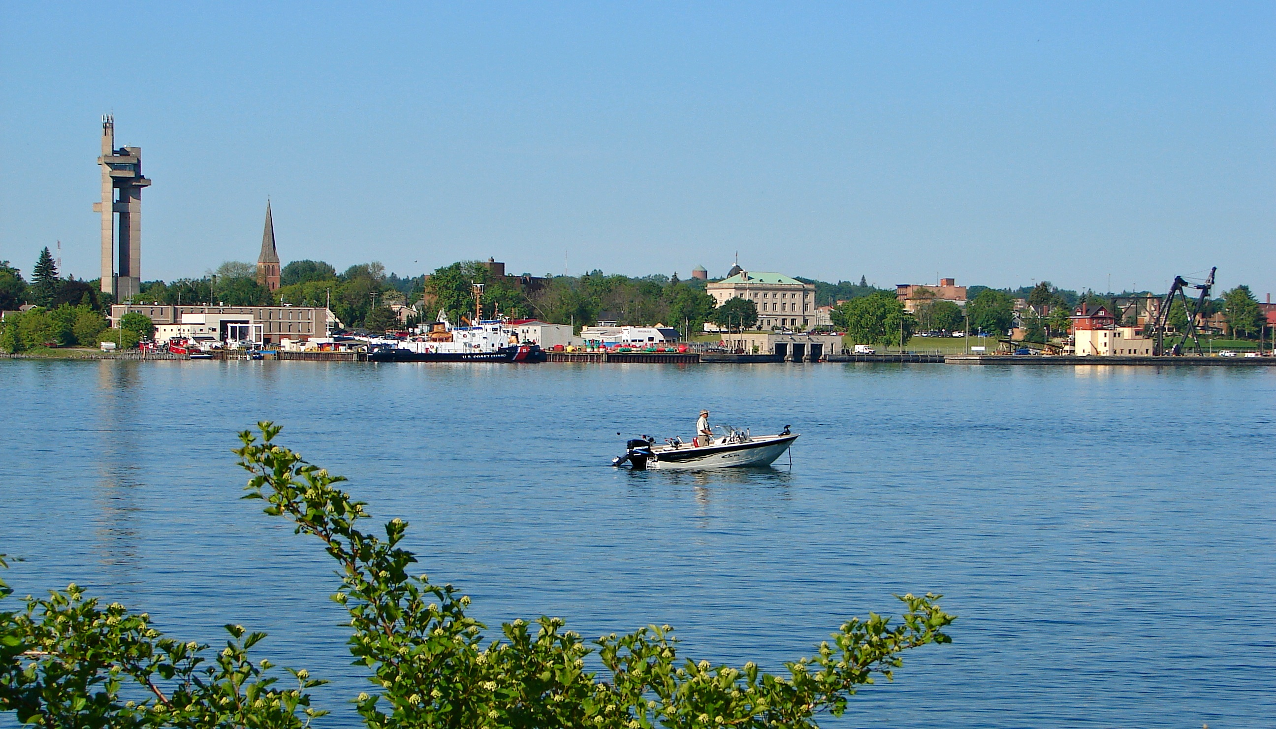 Sault Ste. Marie, Michigan, United States